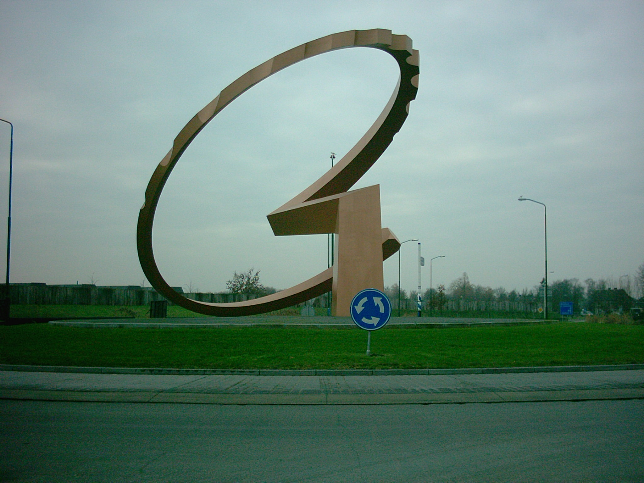 Kunstwerk Accretio (2006) by Ron van de Ven te Lieshout. Gemaakt op: 4 Jan 2006, donker weer.